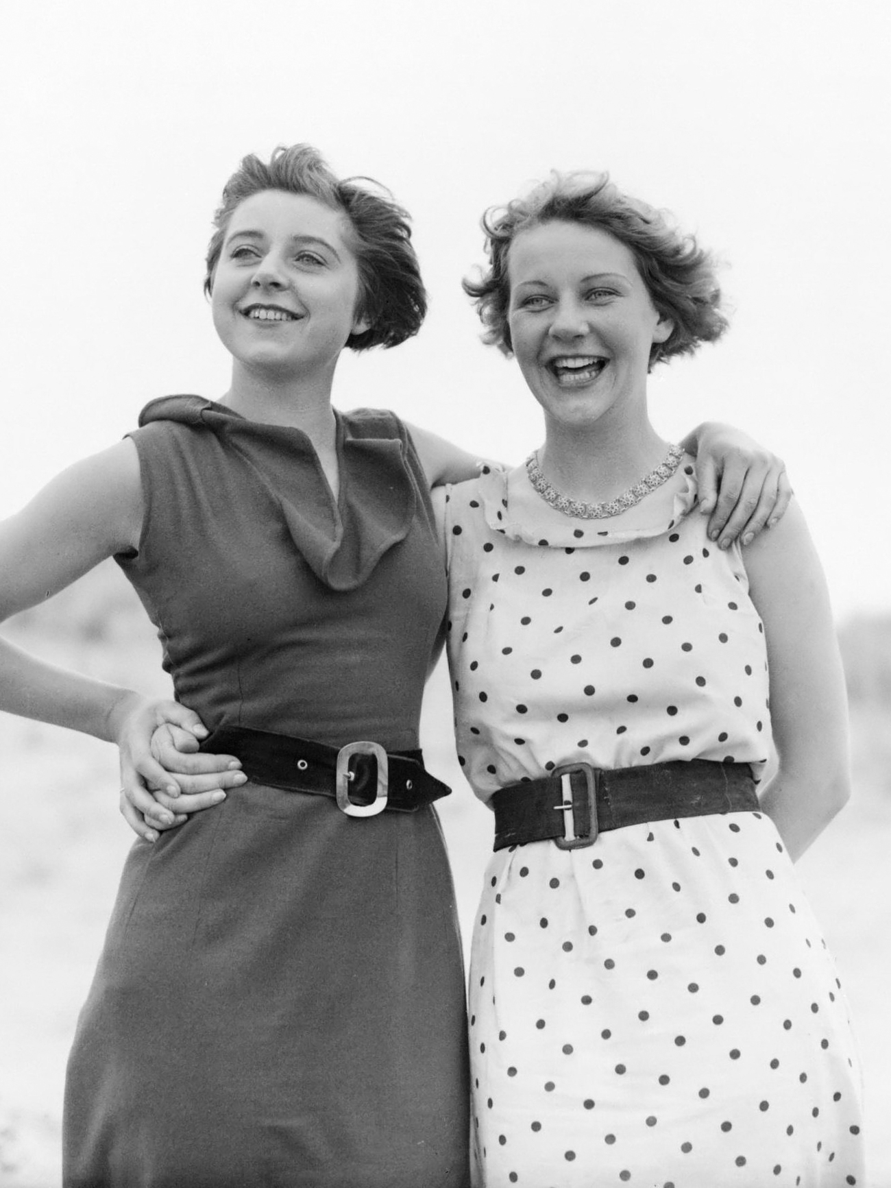 Reportage fotomodel. Actrice en model Cissy van Bennekom (l) en model Eva Waldschmidt omarmen elkaar 1932